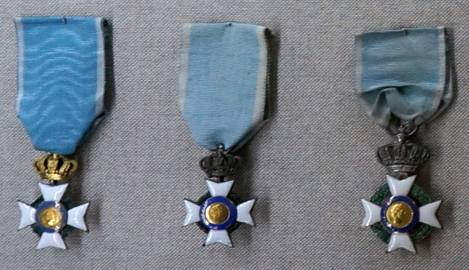 Présentées au musée.